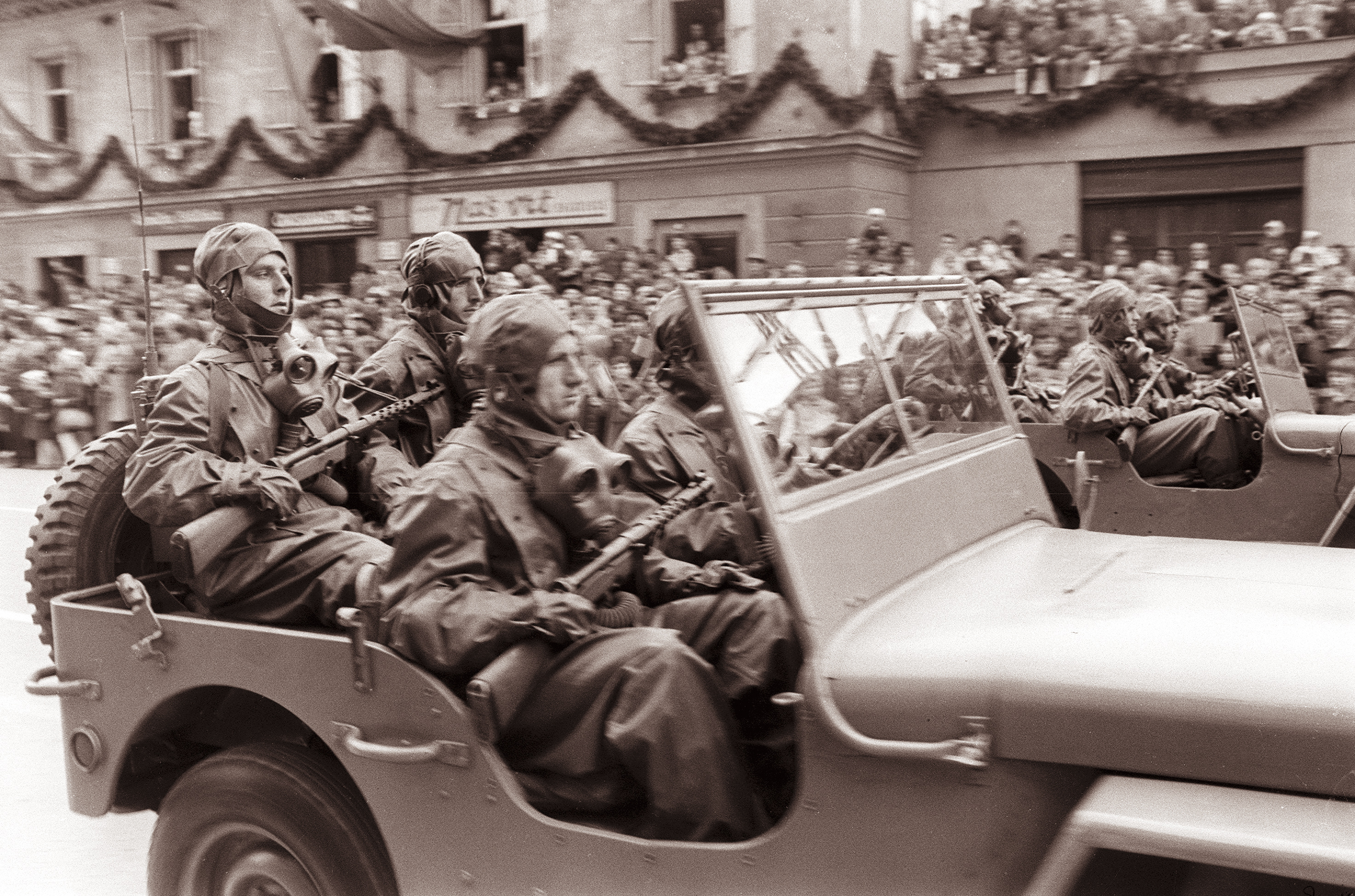 Prvomajski sprevod v Ljubljani